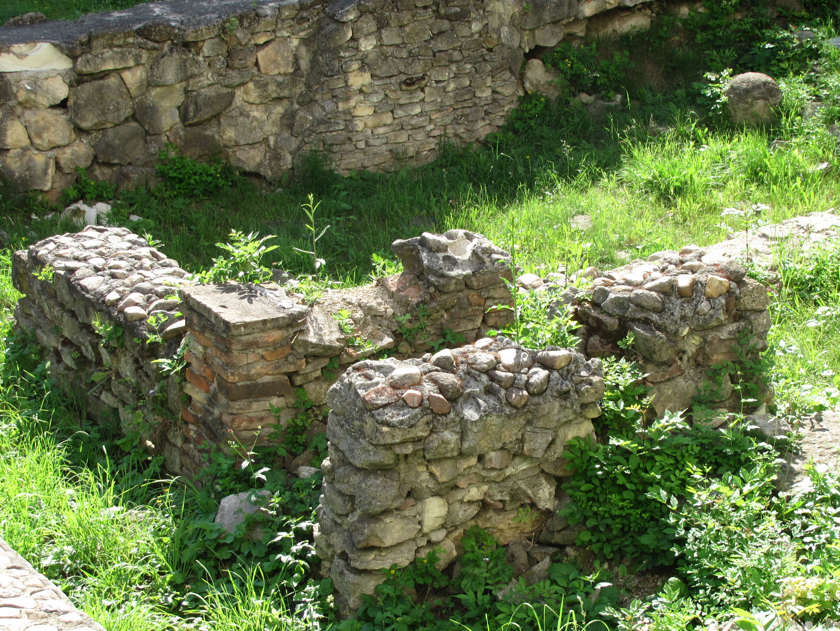 Cluj-Napoca - Parcul arheologic de pe Str. Deleu